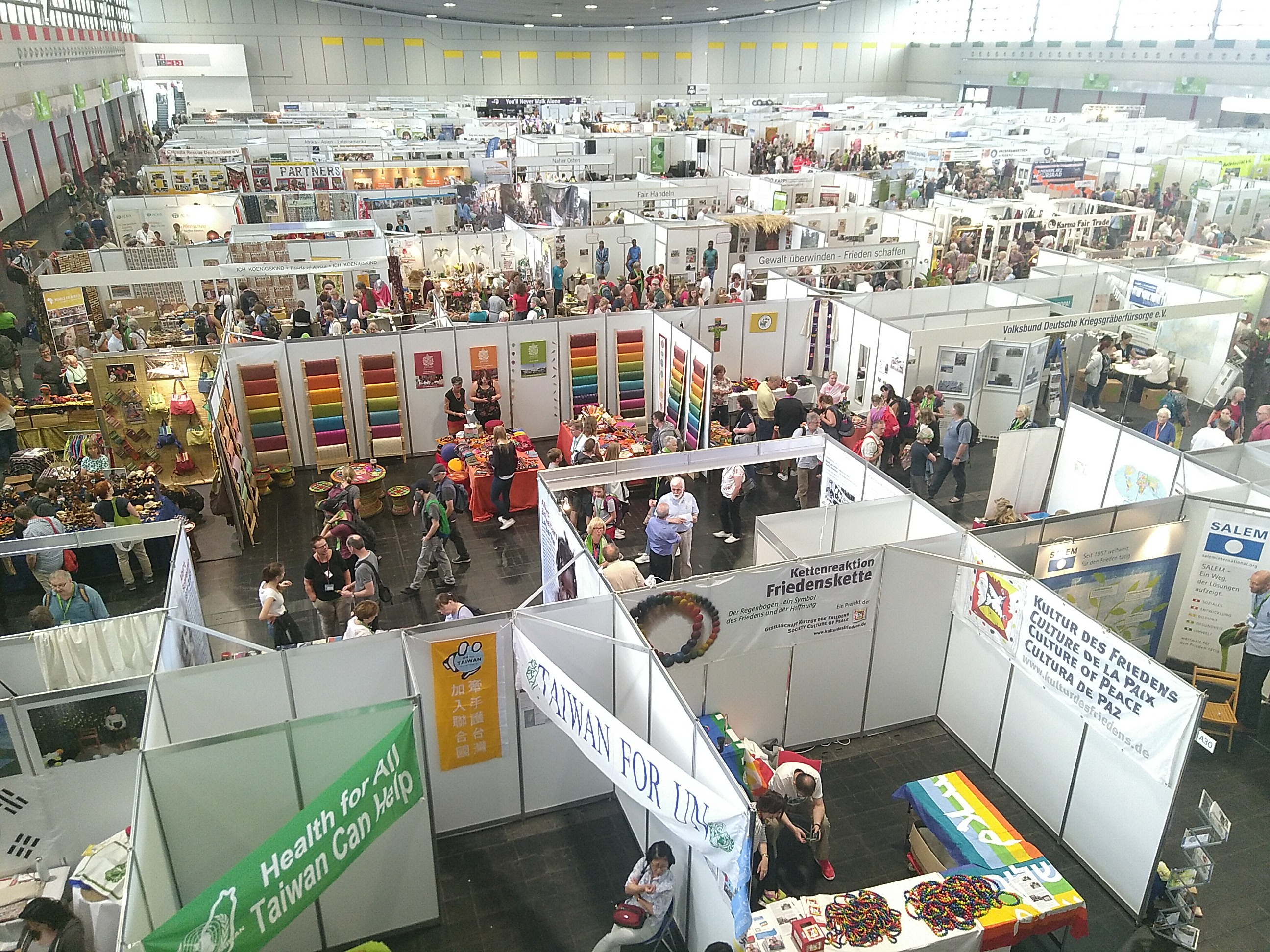 fotografiert auf dem Deutschen Evangelischen Kirchentag 2019 in Dortmund